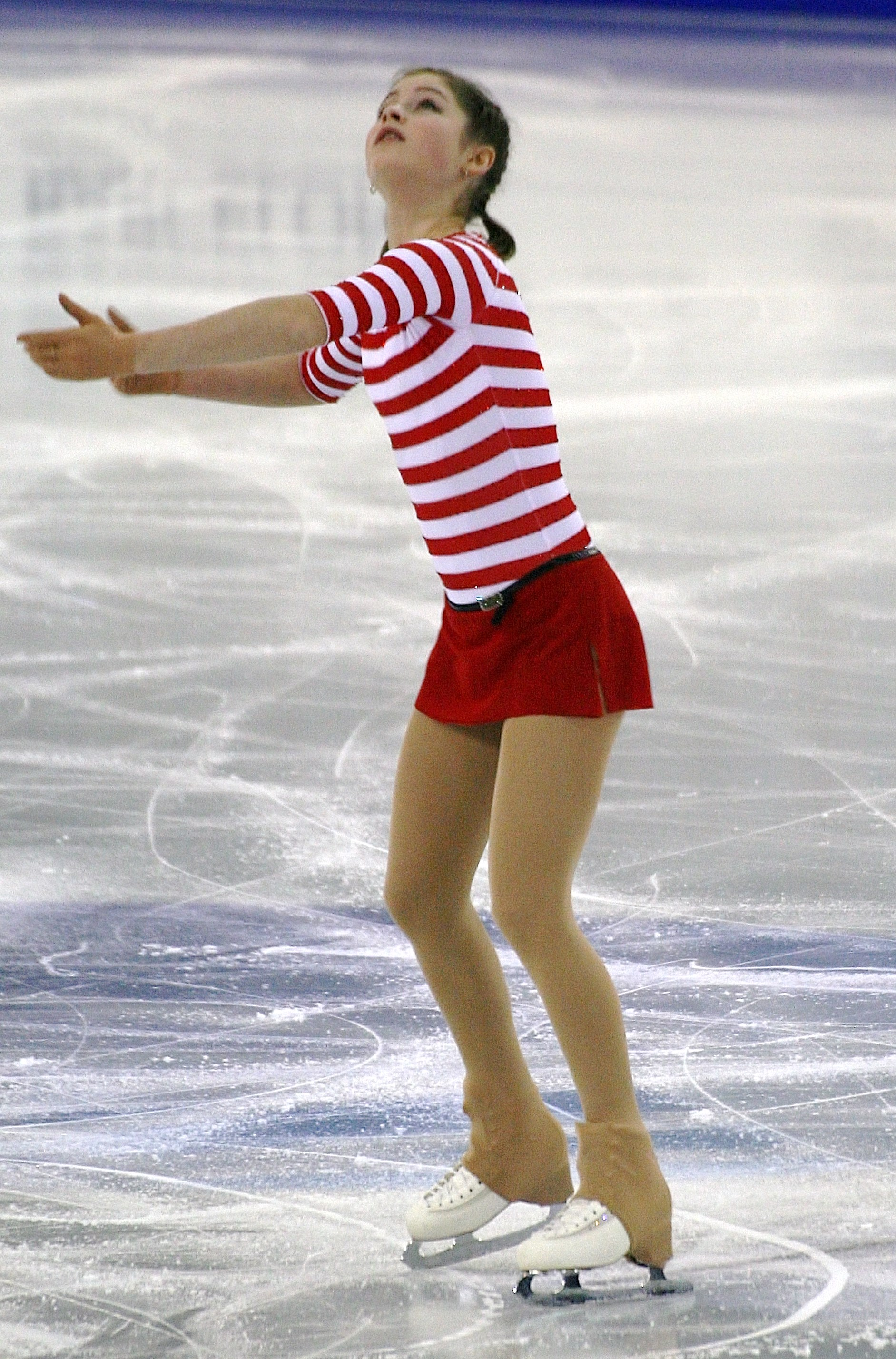 Юлия Липницкая (Россия) в финале Гран-при 2014-2015.